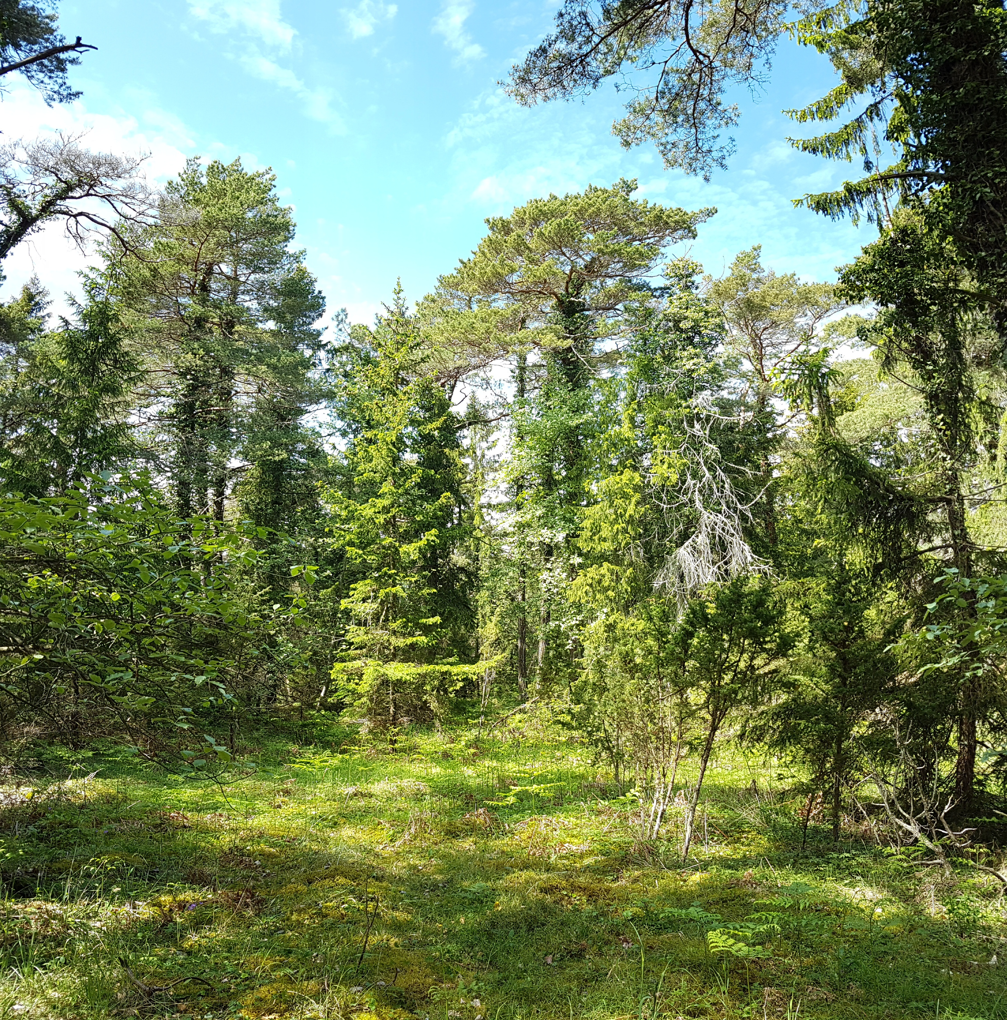 Brucebo naturreservat 2017.